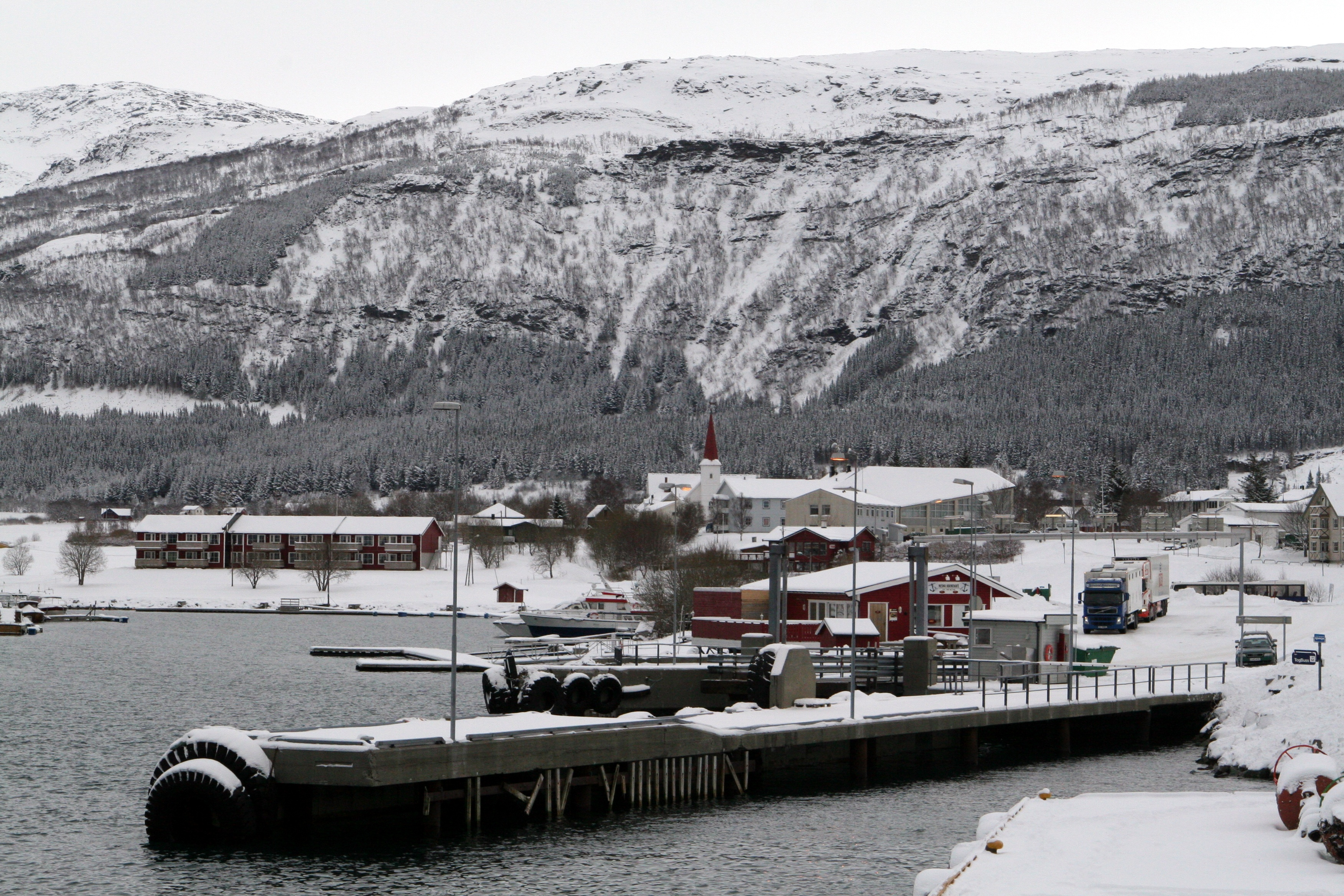 Zicht vanuit de haven. Opname: eind februari 2006